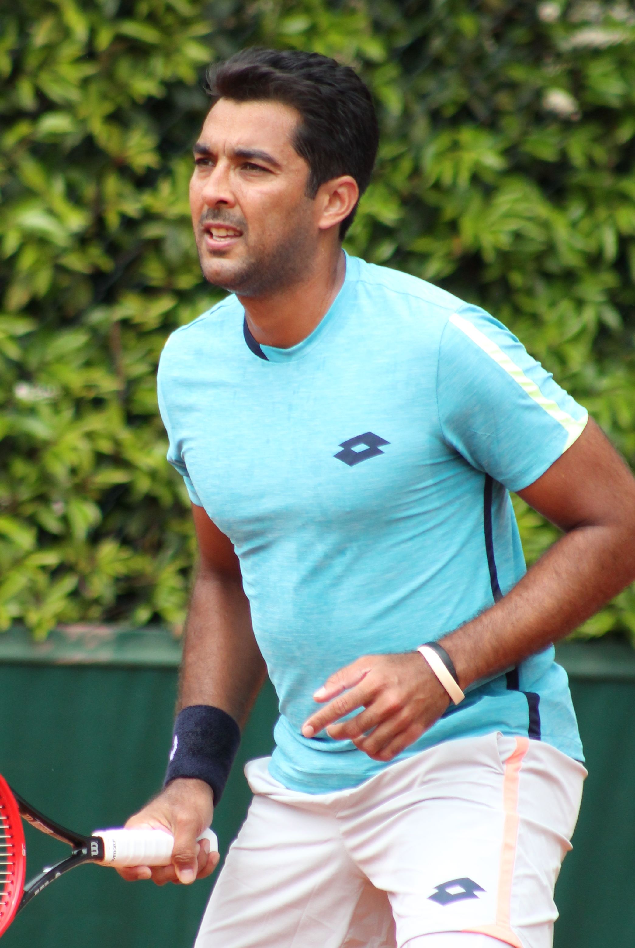 Qureshi RG16 (20)